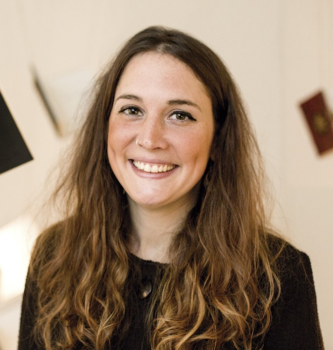 Irantzu Lekue 2019an